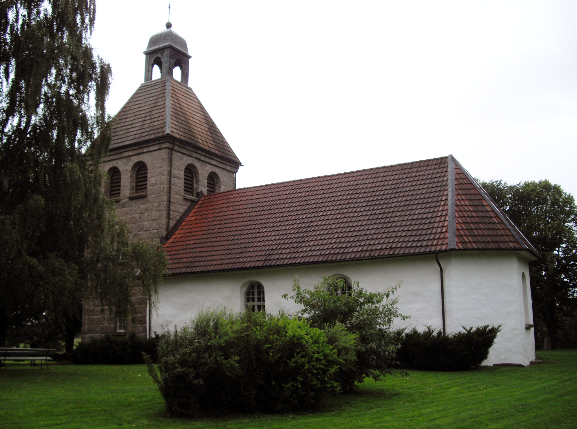 Öra kyrka